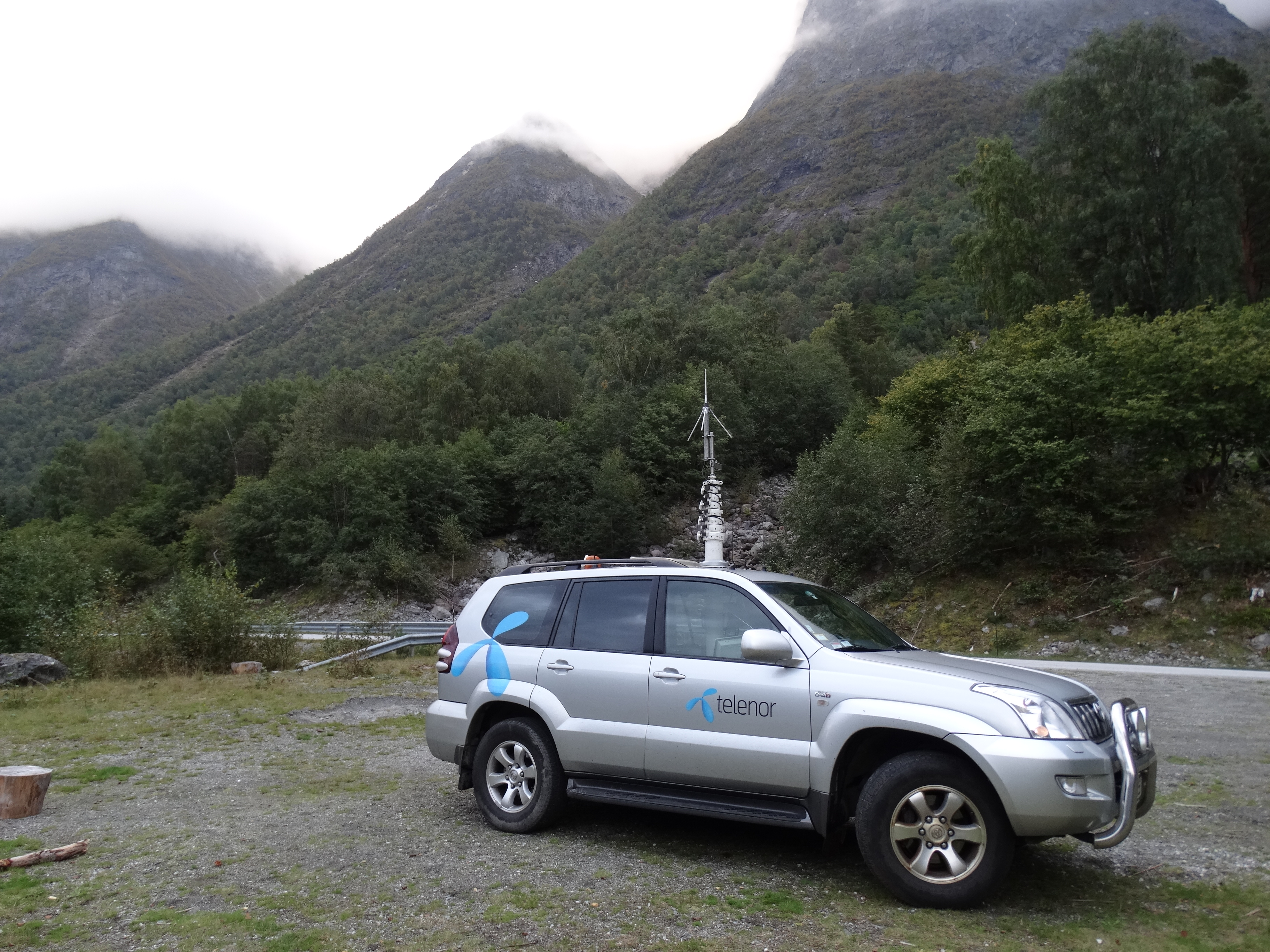 Norkrings målebil for radiosignaler.